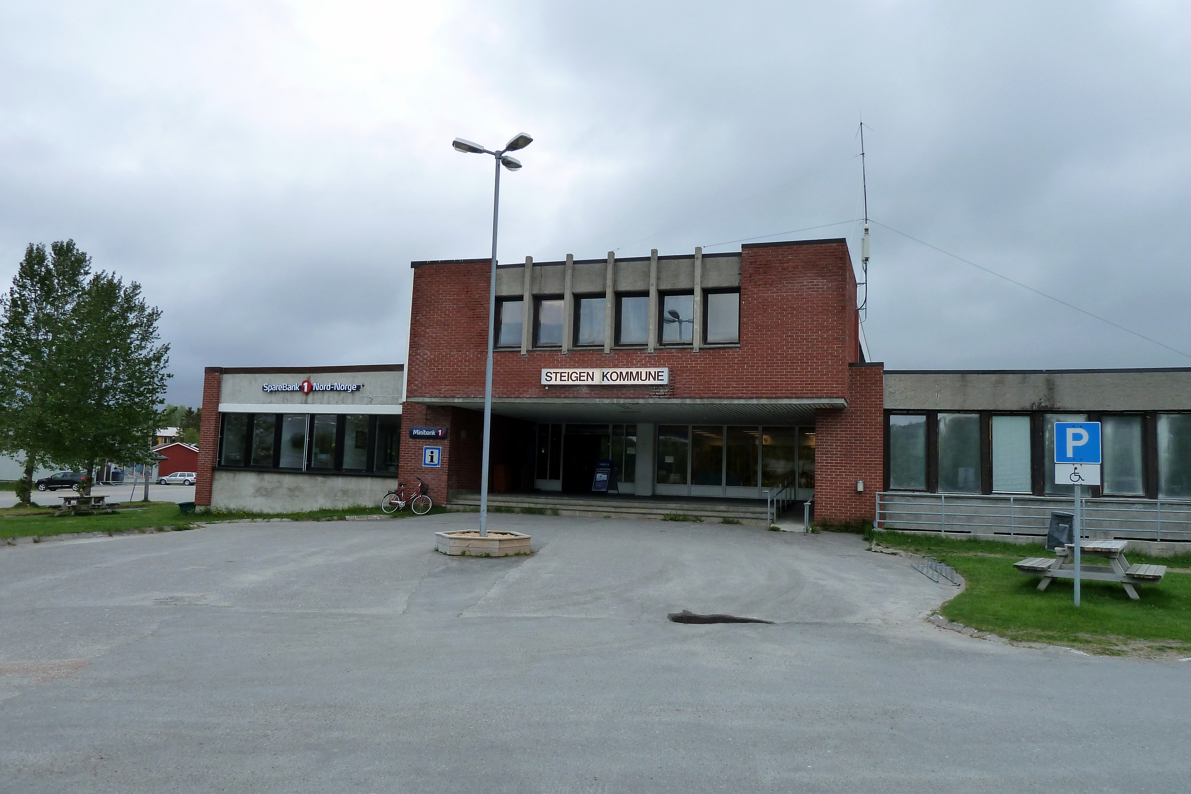 Steigen kommunes administrasjonsbygg i Leinesfjord.